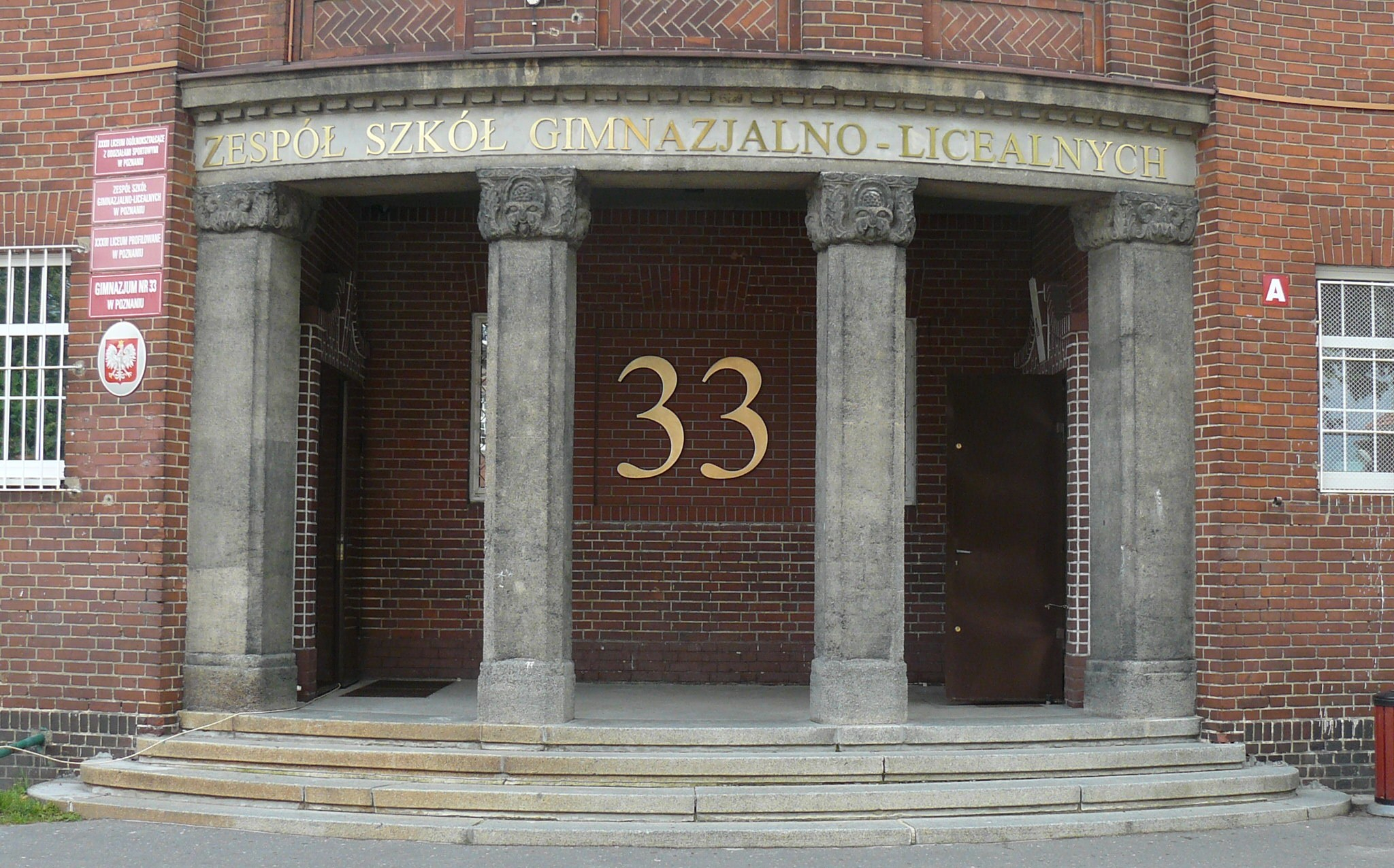 Poznań Łazarz - zespół zabudowań szkolnych (zabytek nr A 258).